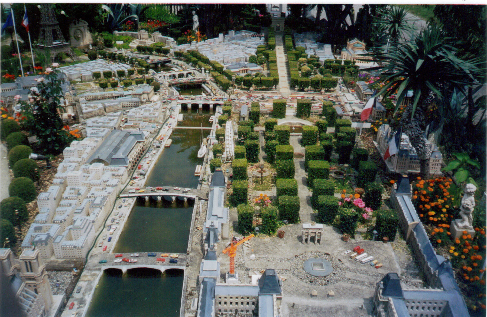 Image du Petit-Paris, Paris en miniature.